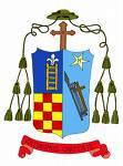 Immagine da me riprodotta su permesso, BL